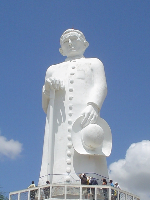 Foto tirada pelo autor na cidade de Juazeiro do Norte em Jan 2006, outro angulo.